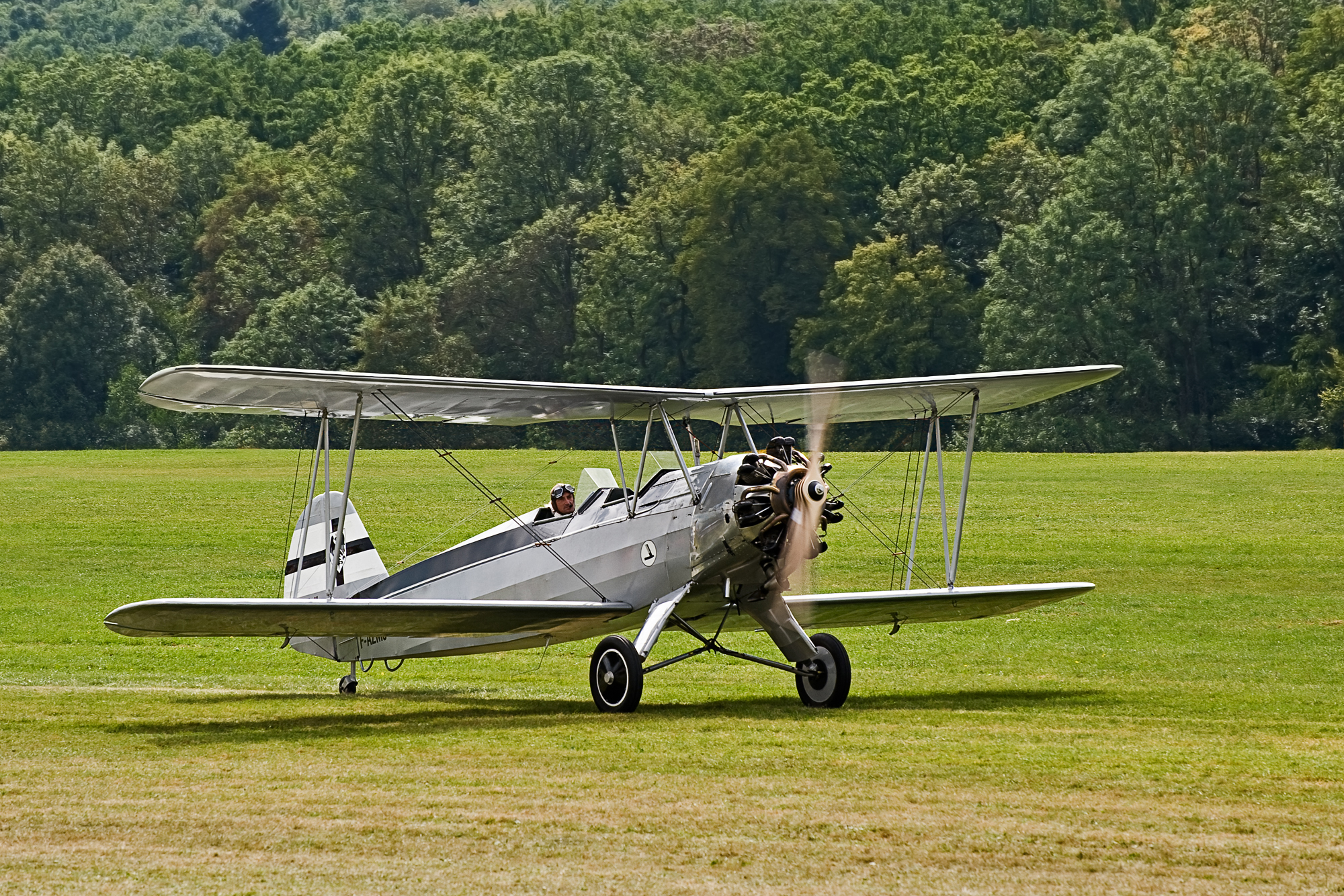 Focke-Wulf FW 44, fotografiert bei der "OTT" 2011. Am Flugfeld Hahnweide, Germany